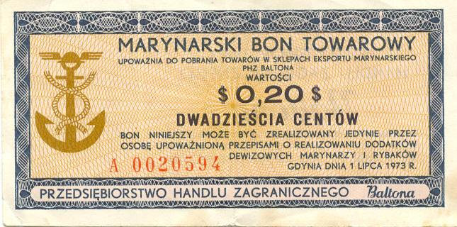 Mój banknot z niewykorzystanego dodatku dewizowego - skan awersu